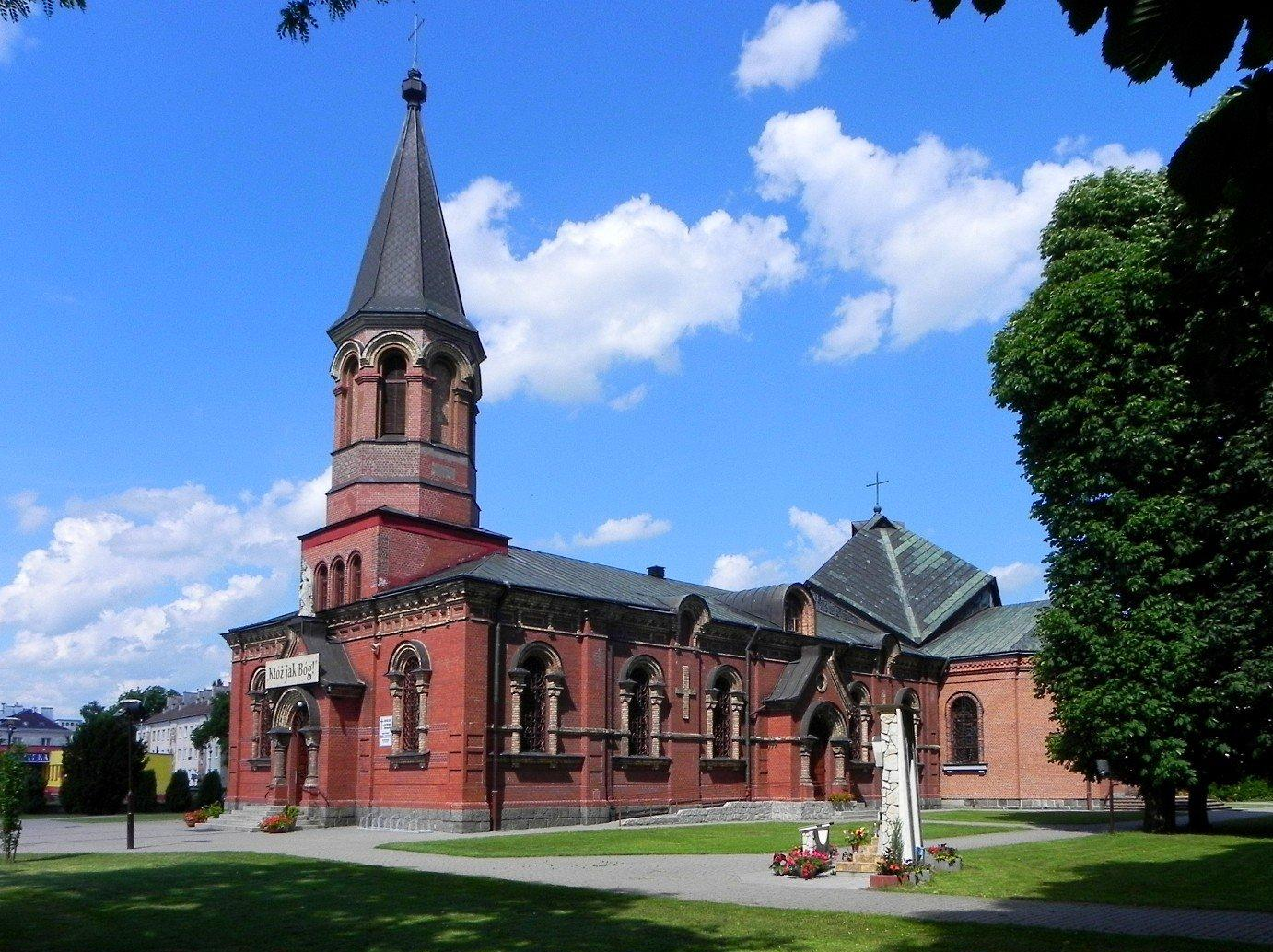 Kościół św. Michała wybudowany został w 1911r. jako garnizonowa cerkiew prawosławna p.w. Przemienienia Pańskiego. Świątynia w 1918r. przekazana została kościołowi katolickiemu i przebudowana dla potrzeb duszpasterstwa wojskowego, pełniąc funkcję kościoła garnizonowego.